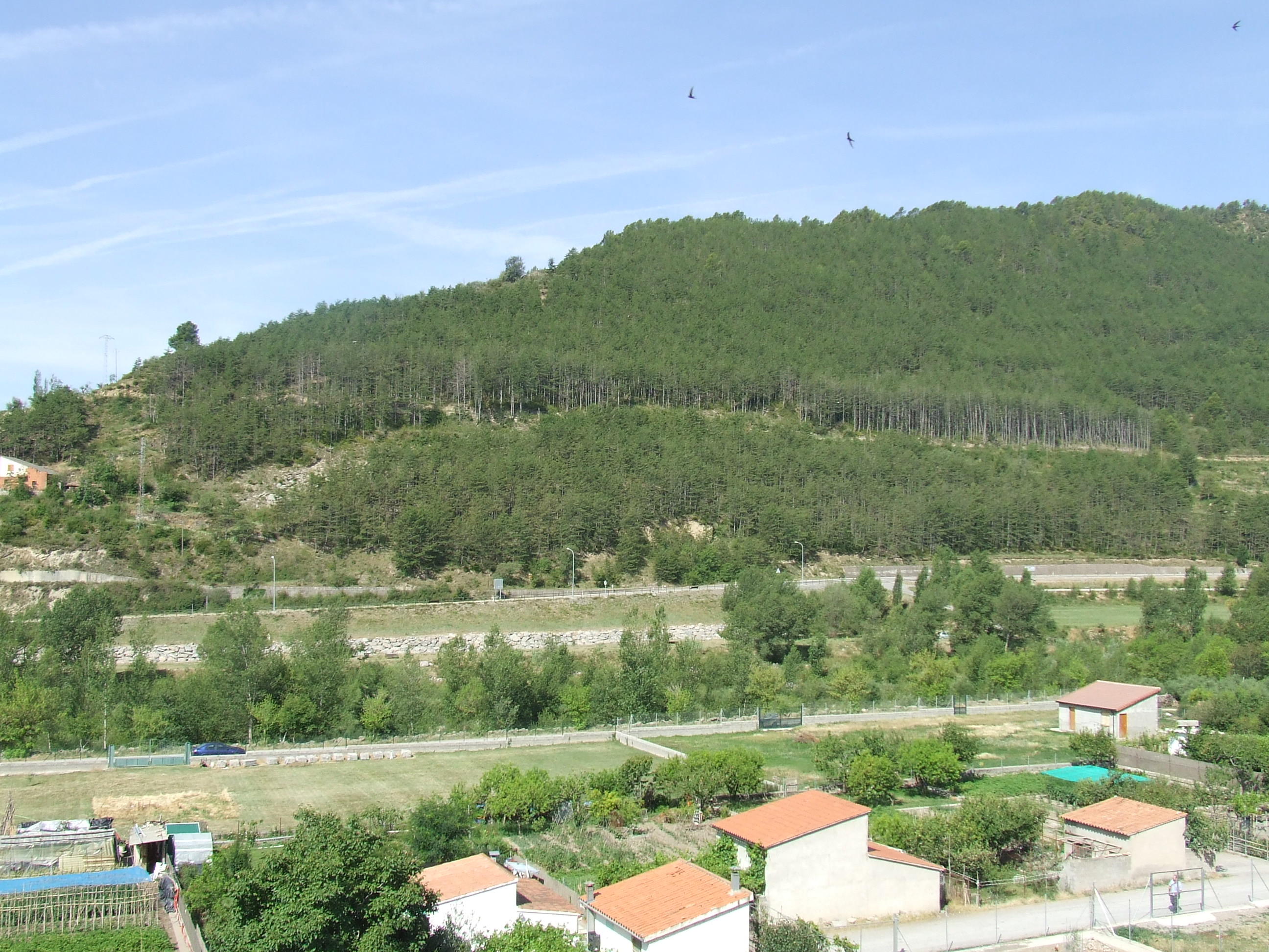 La Muntanya de Santa Magdalena (la Pobla de Segur, Pallars Jussà)